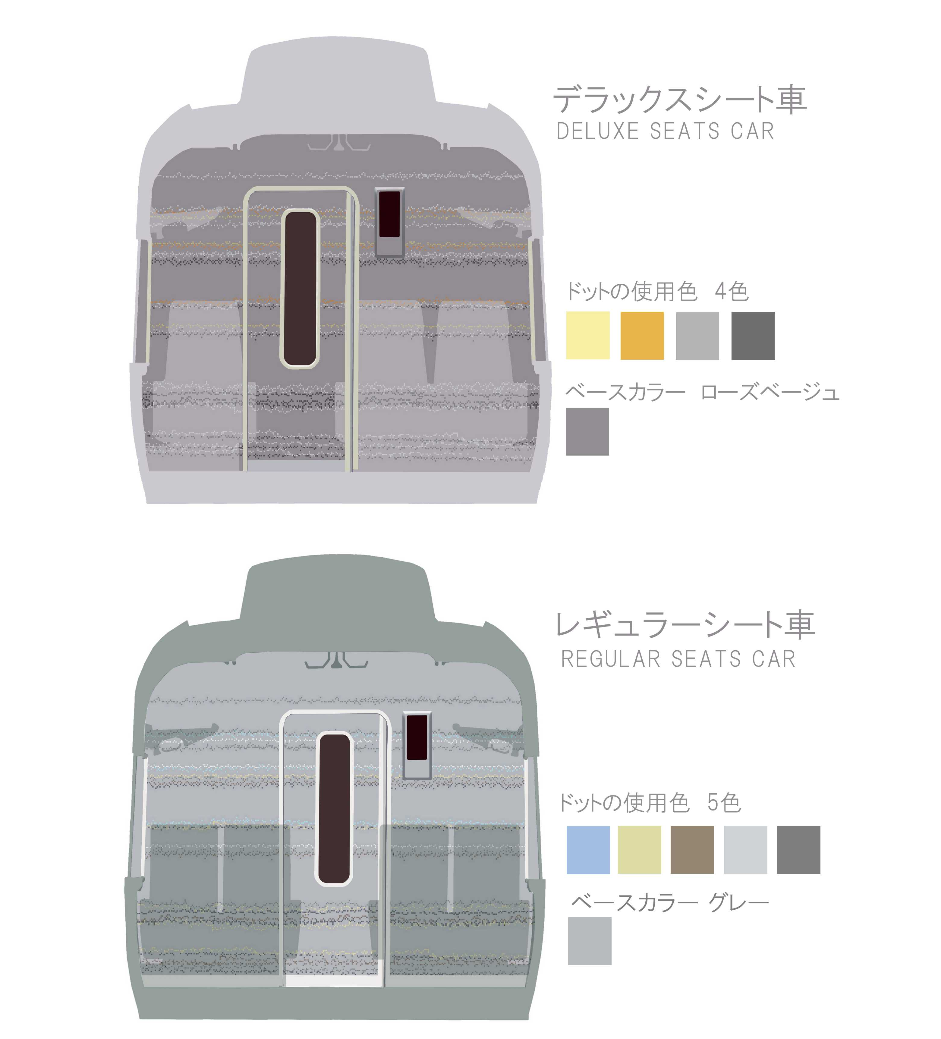 アーバングラデーションの参考図